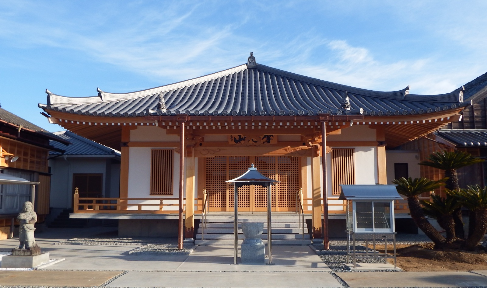 東禅寺の本堂